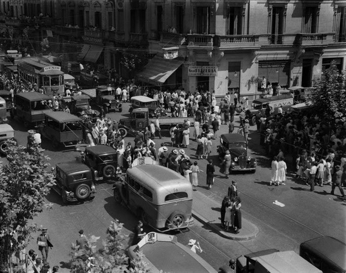 Congestión de tránsito por una manifestación, Buenos Aires, en 1936. Esquina sin identificar.